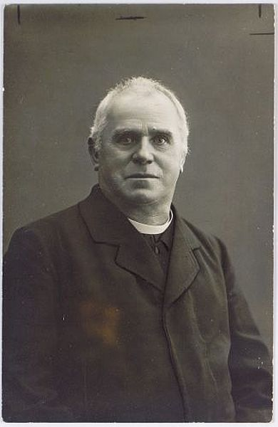 Jakob Aljaž (1845-1927), Slovene composer and priest.